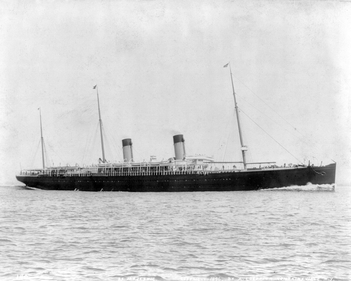 SS Majestic.